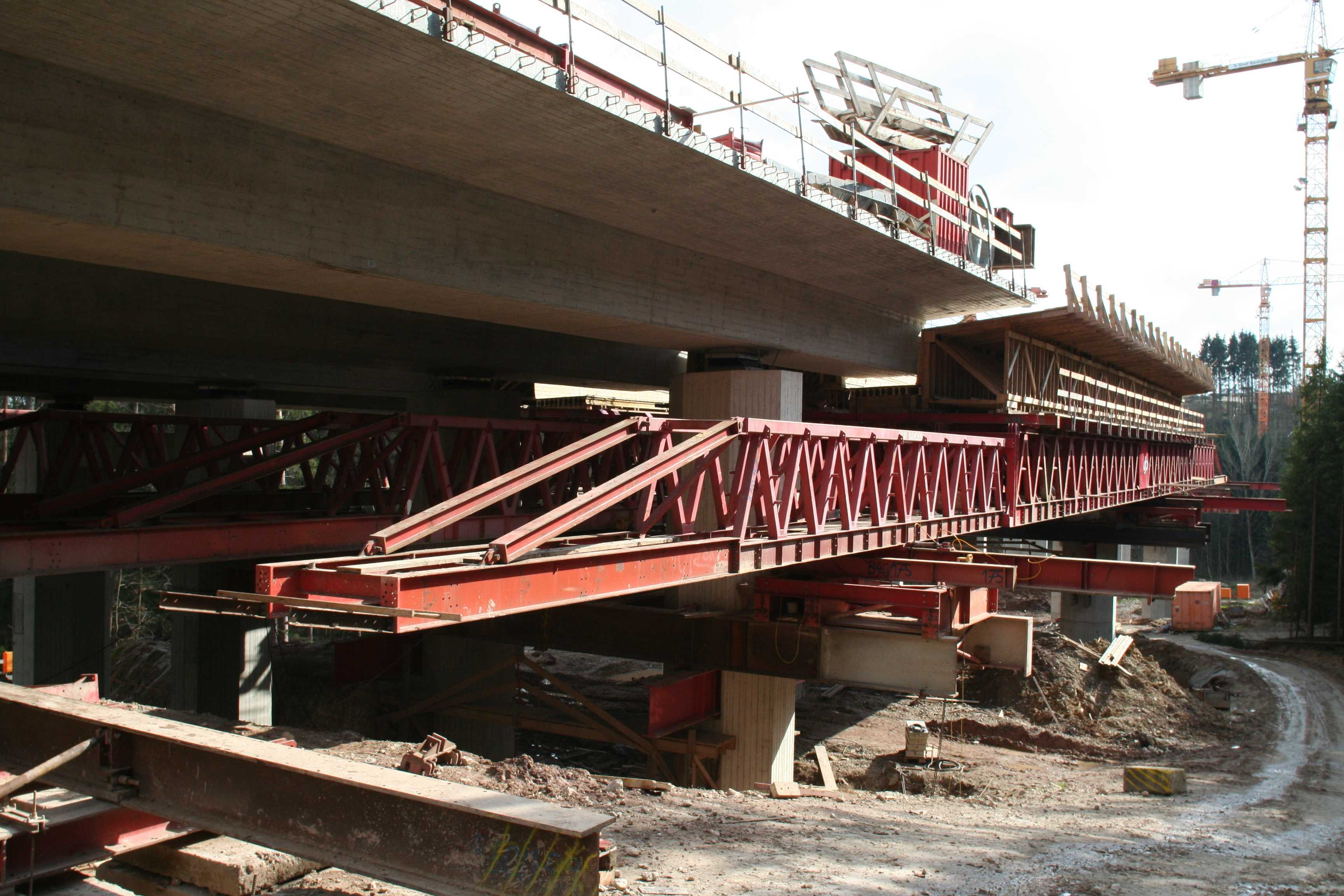 Talbrücke Nestelgraben, Bundesautobahn A73 bei Lichtenfels